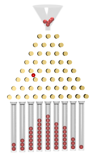 Galtonbräda